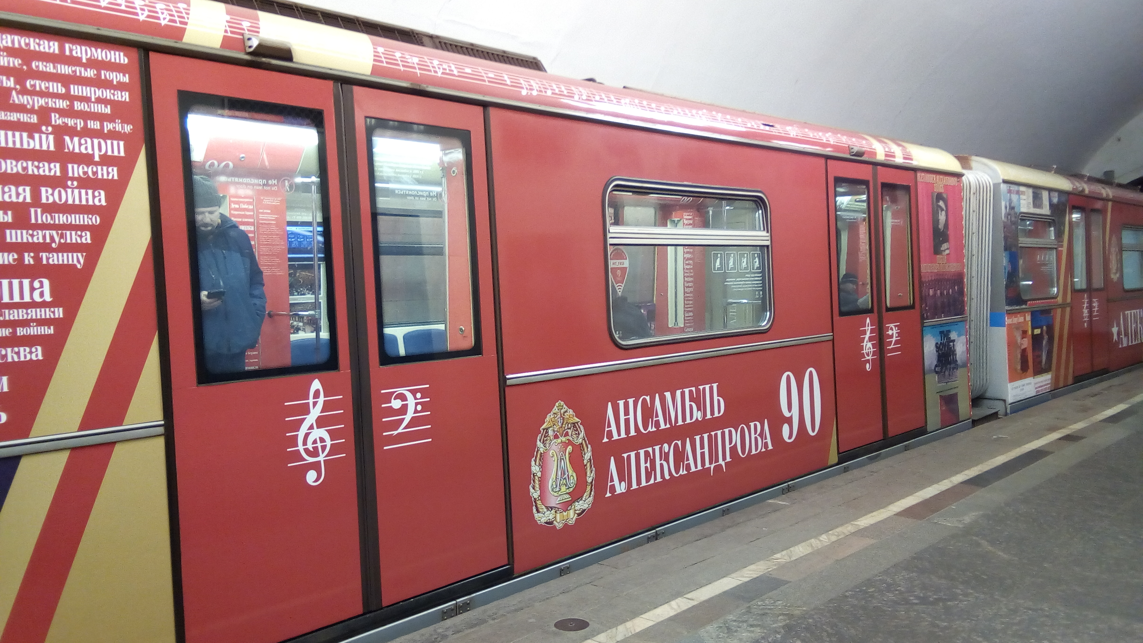 Поезд «Александровец» на Кольцевой линии (19.03.19)